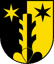 Wappen von Riedern Kanton Glarus Schweiz